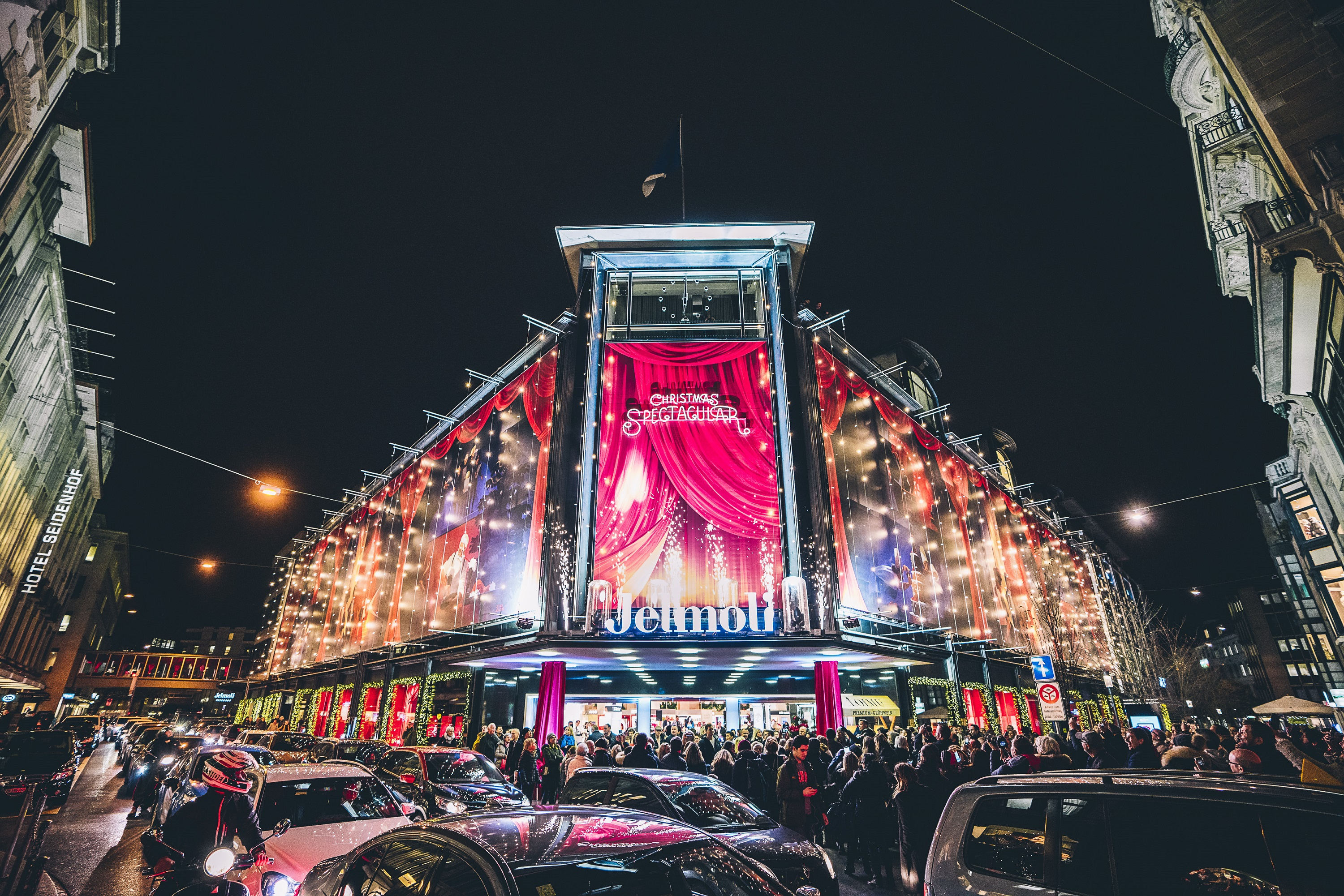 Kampagne Xmas 2019